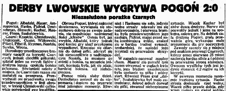 Замітка з часопису Przegląd Sportowy зі звітом про гру «Погонь» — «Чарні»